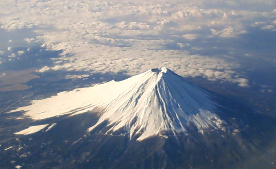 Mount Fuji 富士山（上空から撮影）